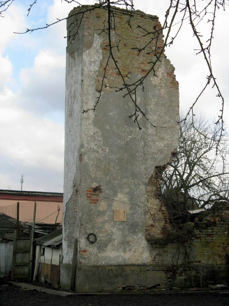 Беларуская (тарашкевіца): Клецак